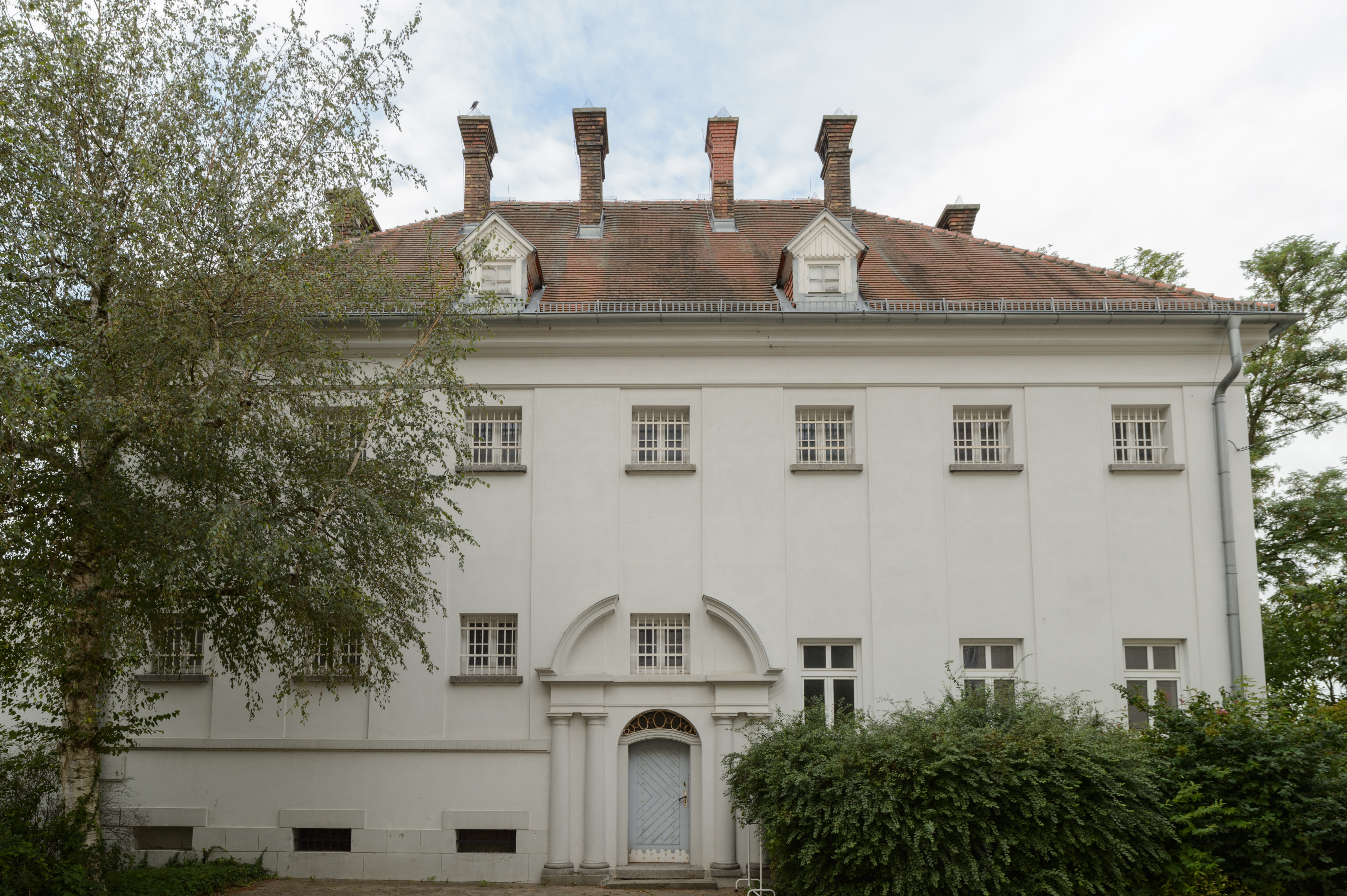 das ehemalige Gefangenhausgebäude in Kirchberg am Wagram